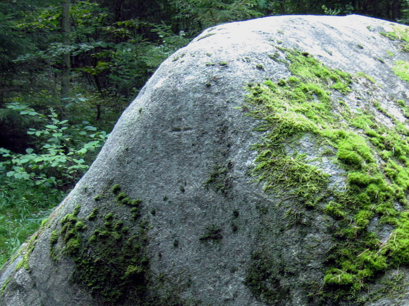 Сякераўцы. Вялікі камень з адзнакай